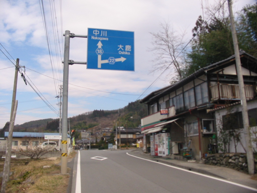 県道22号起点付近